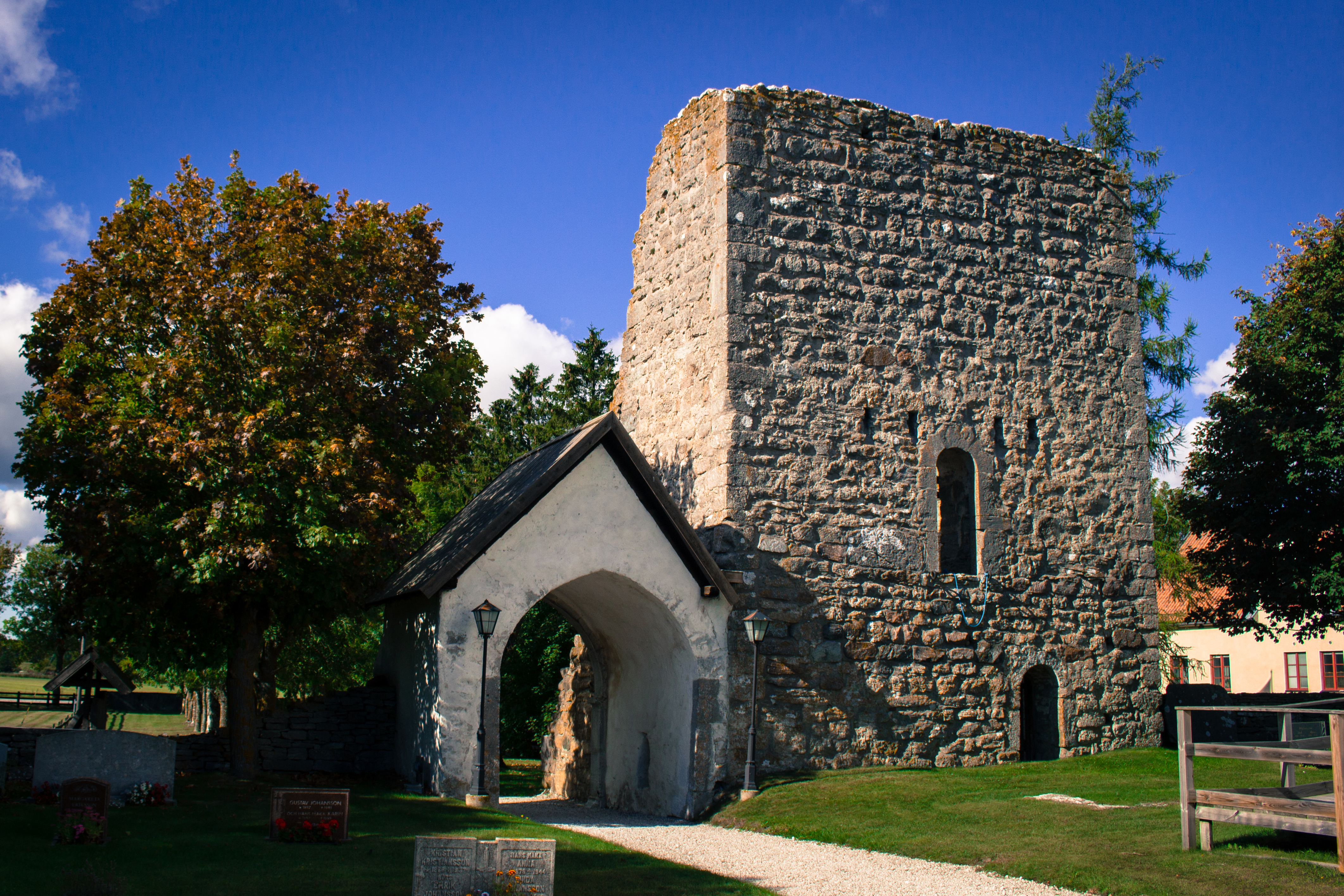 Torre defensiva e lychgate da igrexa de Gothem, na illa sueca de Gotland.